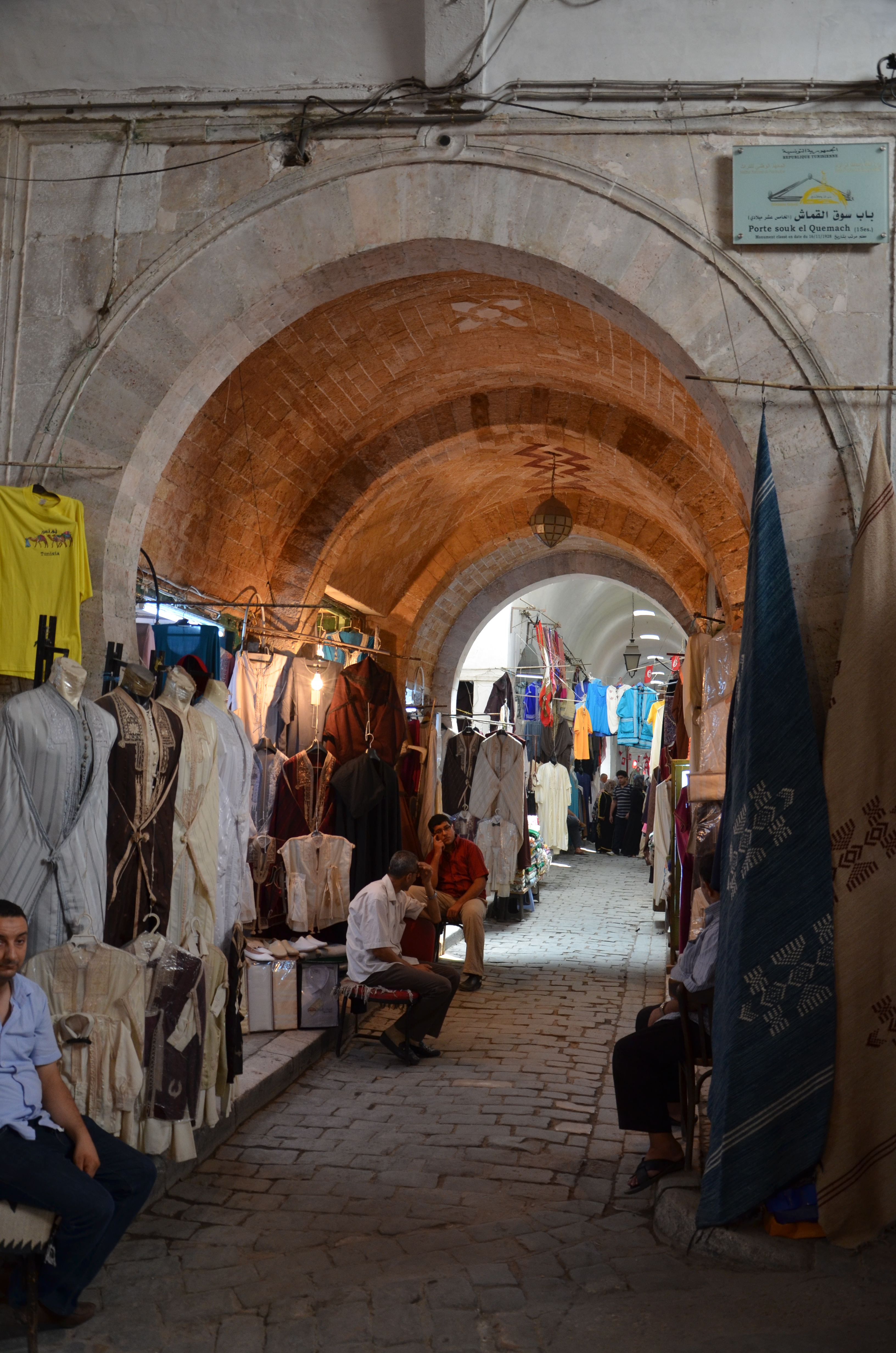 Porte et colonnade du souk des Étoffes, Tunis